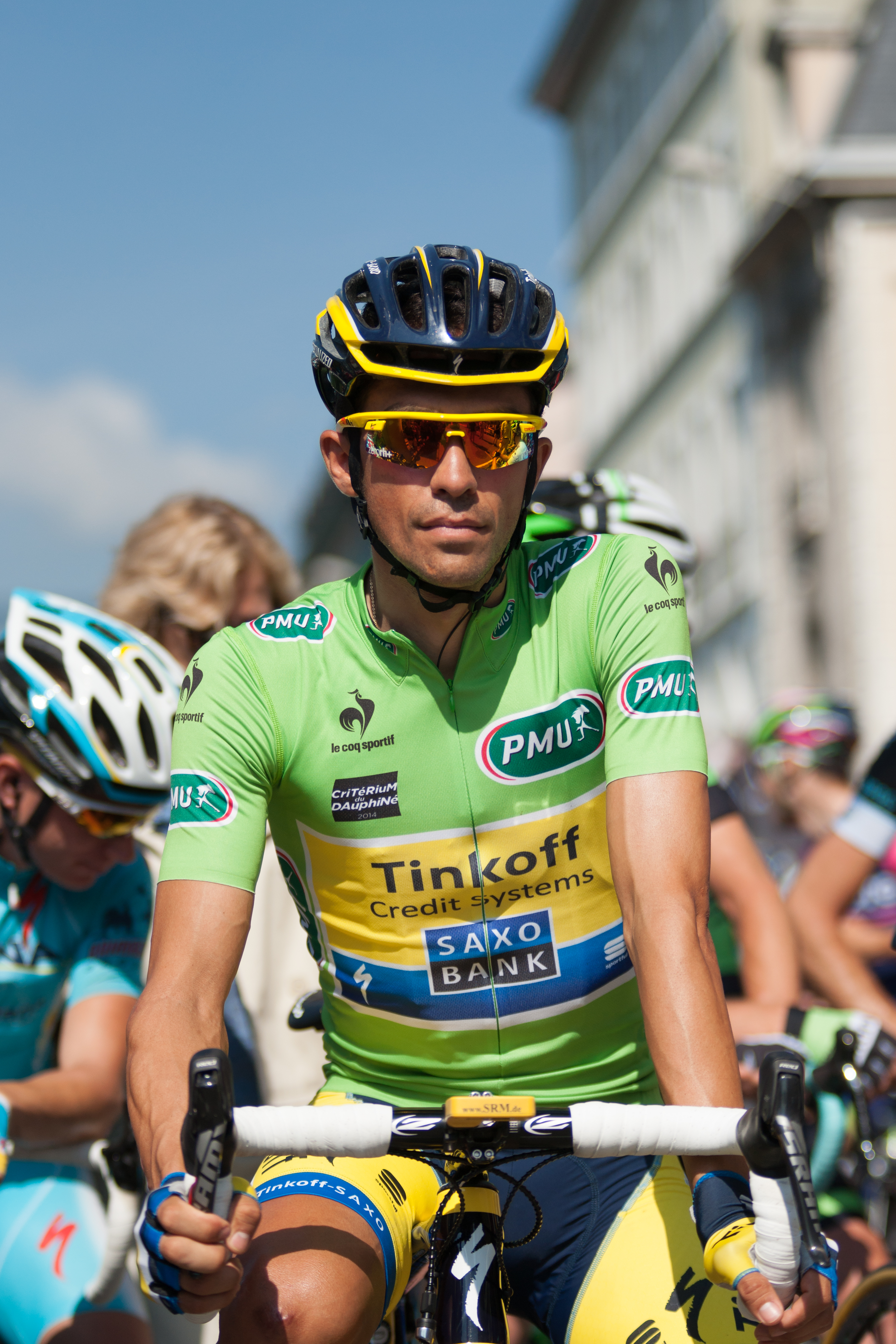 Critérium du Dauphiné 2014 - Etape 6 - Alberto Contador